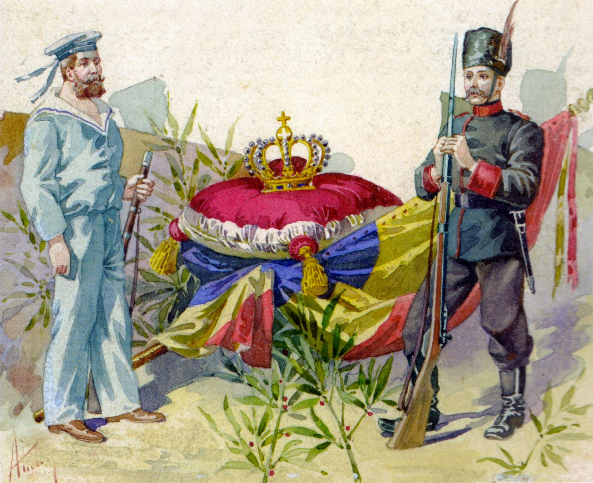 Coroana regală a României, acuarelă, Biblioteca Academiei Române